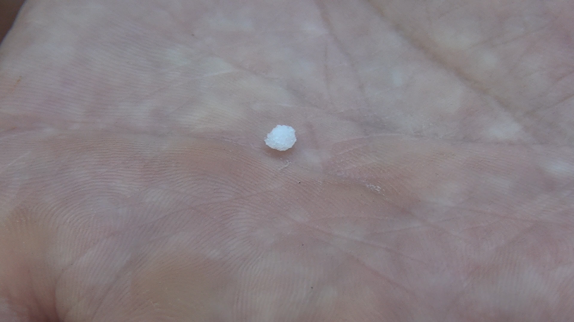 Grain de manne solide de Briançon